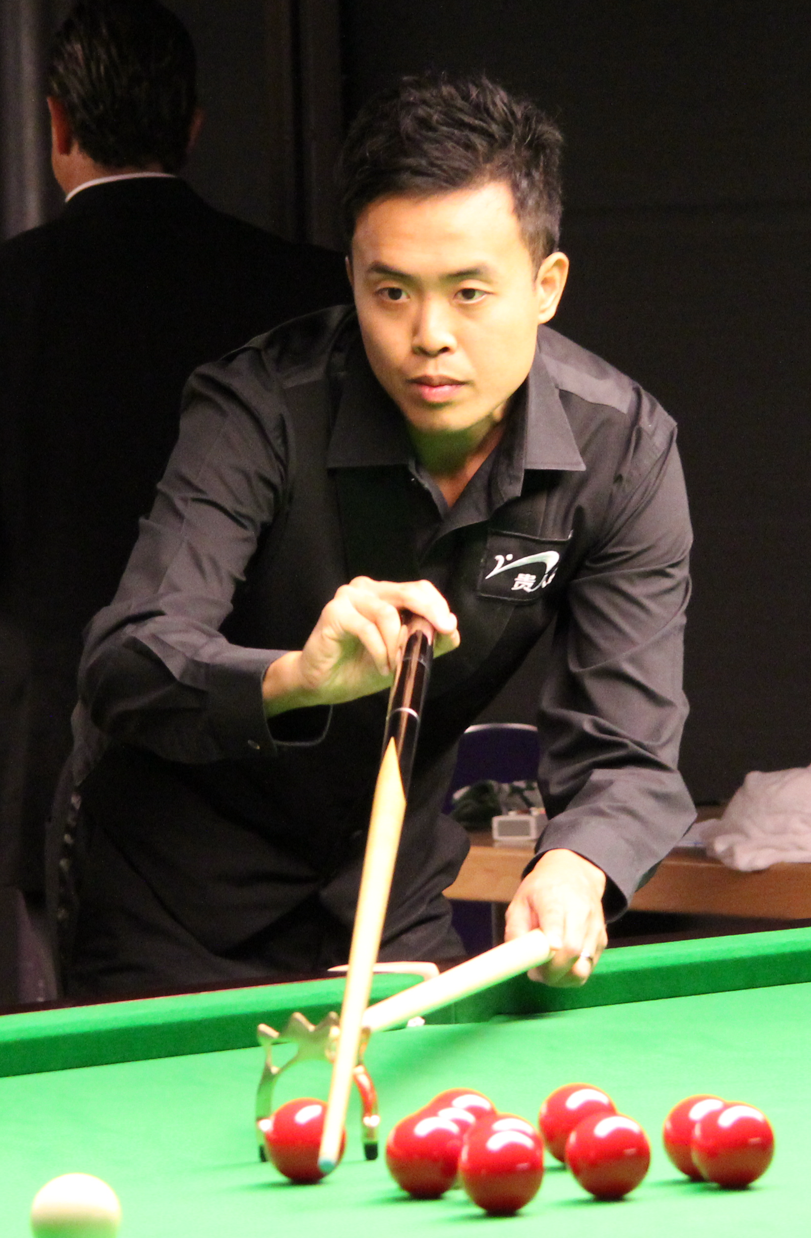 Marco Fu beim Paul Hunter Classic 2011